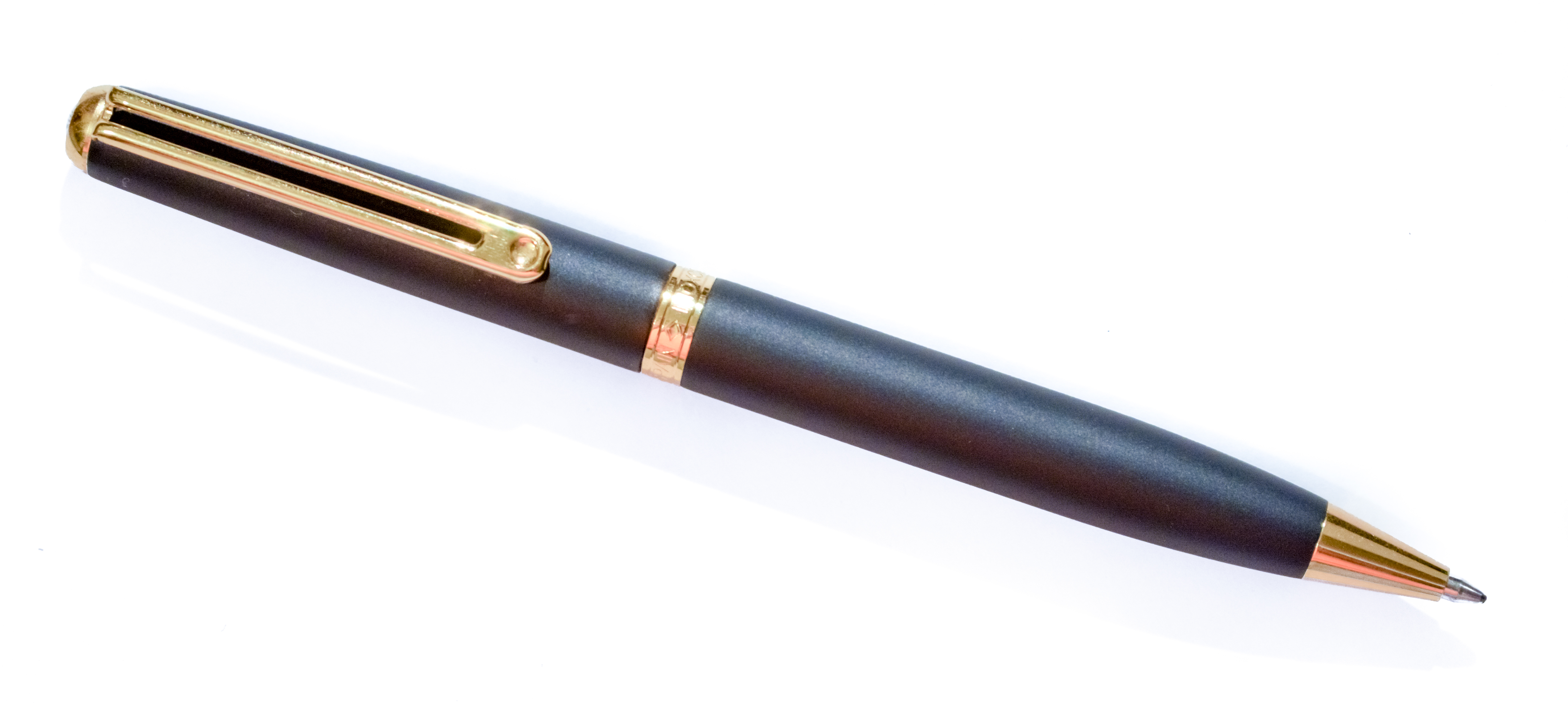 Bolígraf Inoxcrom Wall Street